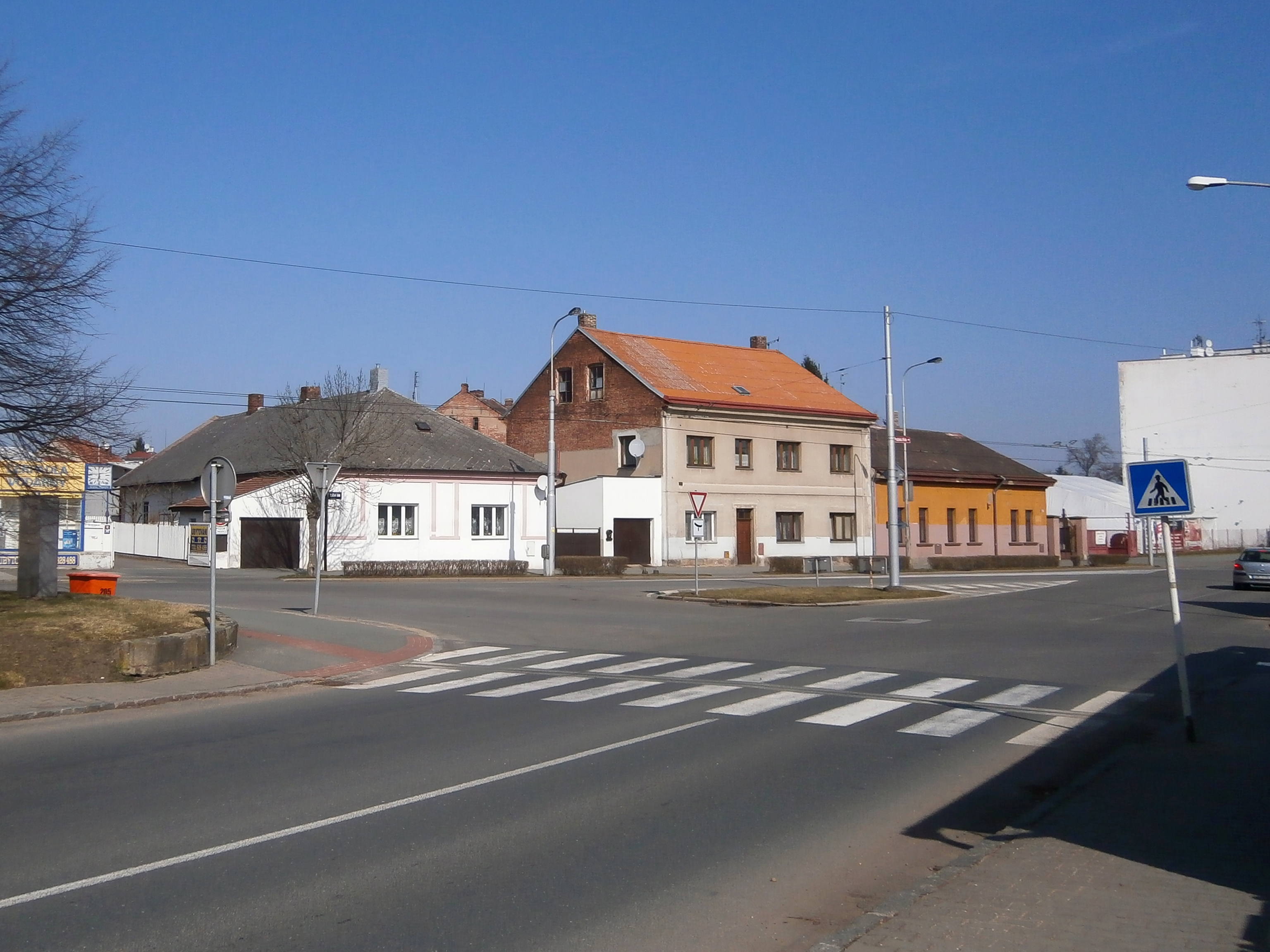 Pražská třída čp. 484, 182 a 11